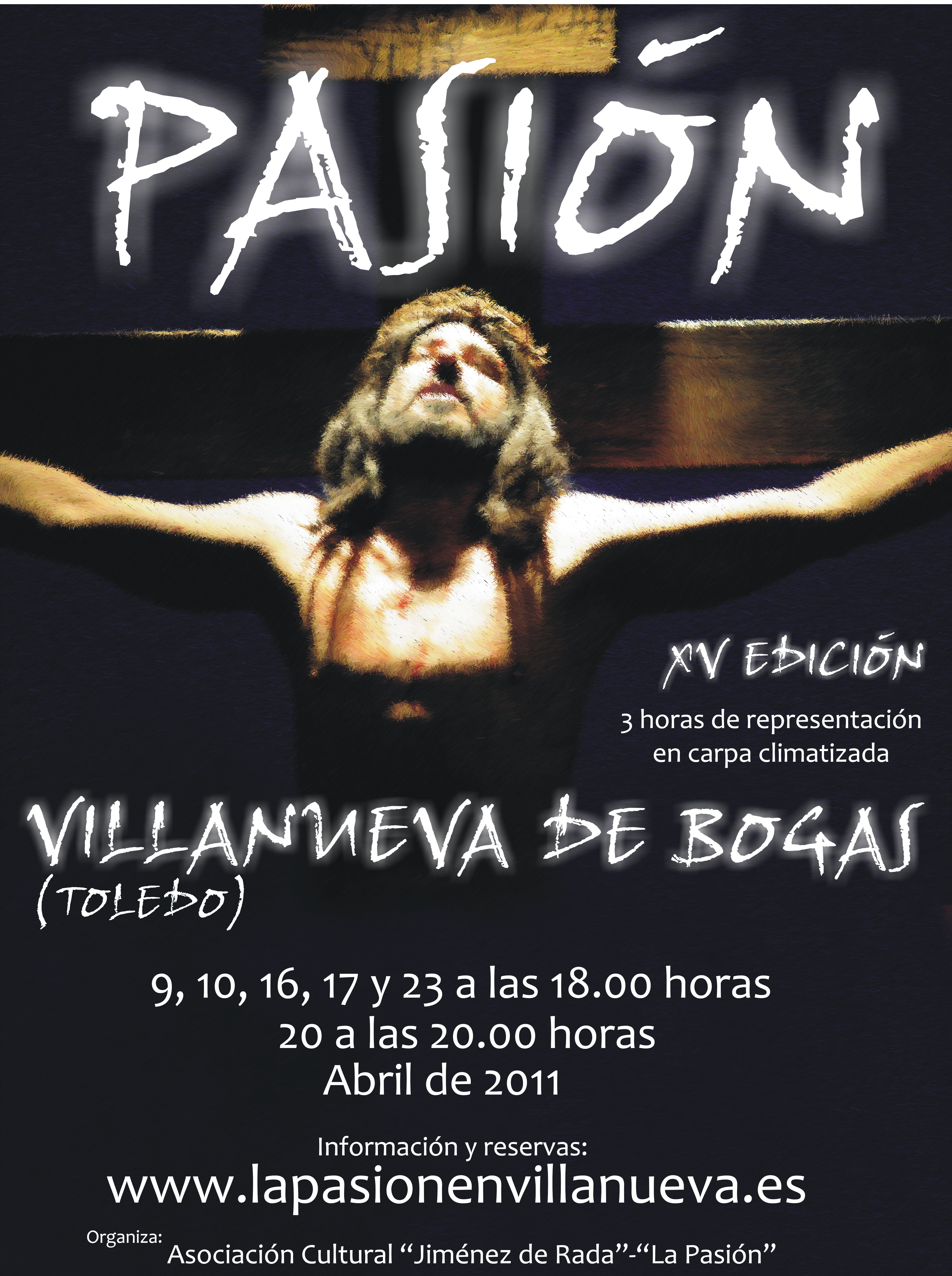 La Pasión de Villanueva de Bogas es una representación dramatizada de los último días de la vida de Jesucristo. Más info en la web